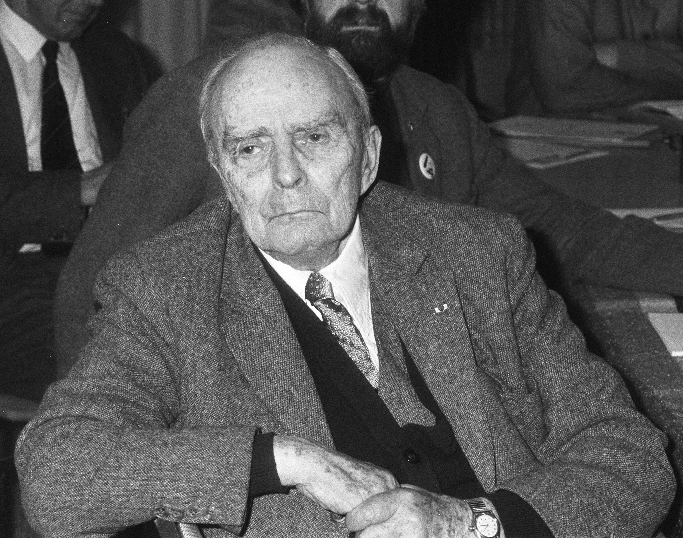 Nobelprijswinnaar Seán MacBride nam het 1 exemplaar van de Engelse vertaling dagvaarding tegen de staat in ontvangst Mozeshuis, Amsterdam